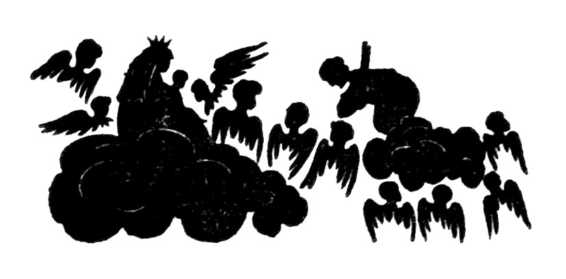 Luise Duttenhofer / Holzschnitt: Johann Wilhelm Gottlieb Pfnor: Verklärung Müllers (1821), schwarzer Scherenschnitt, Eingangsvignette für das Gedicht „Verklärung Müllers“ aus dem Gedichtband „Lautentöne“ von Christian Gottlob Vischer (Vischer 1821, Seite 101). Das Gedicht verherrlicht den Kupferstecher Johann Friedrich Müller (1782-1816), den ältesten Sohn des Stuttgarter Kupferstechers Johann Gotthard Müller (1747-1830). Als sein Hauptwerk gilt die Sixtinische Madonna nach Raffael. Mit 32 Jahren erhielt er den Ruf als Professor der Kupferstecherkunst nach Dresden, starb aber bereits 1816, erst 34jährig, in Pirna/Sachsen. Der gekrönte Künstler thront in den Wolken des Olymp, umringt von lobpreisenden Engelsköpfchen (geflügelte Putten ohne Leib) und einem auf Wolken schwebenden Engel, der sich niederknieend vor dem Meister verbeugt.